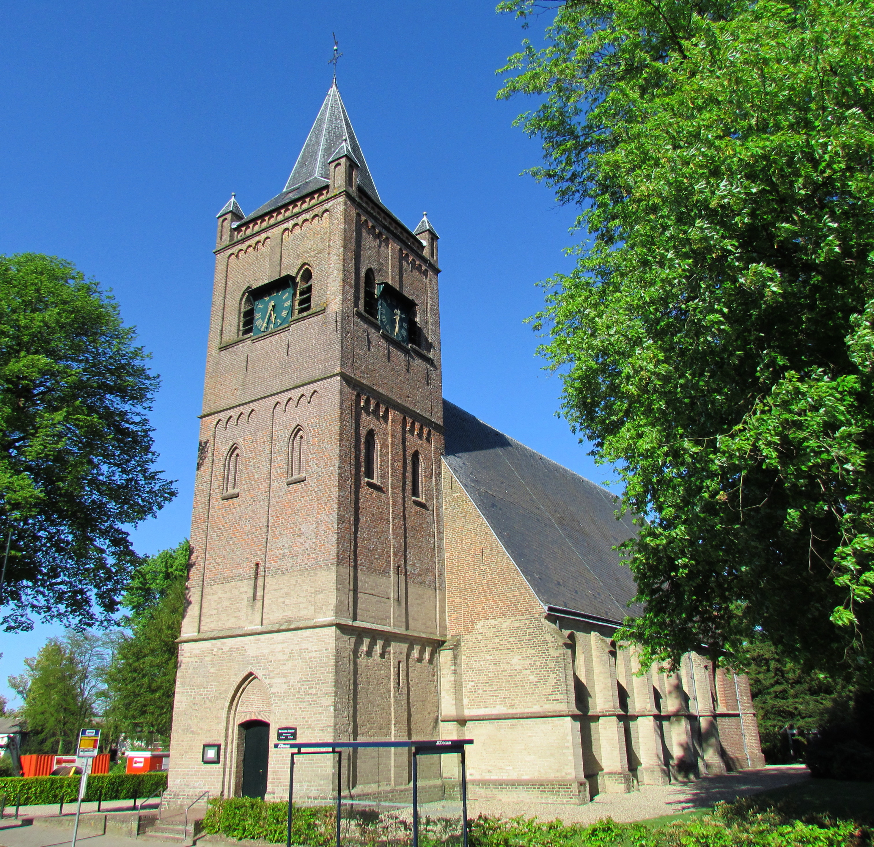 Toren van de NH kerk in Beekbergen, NL